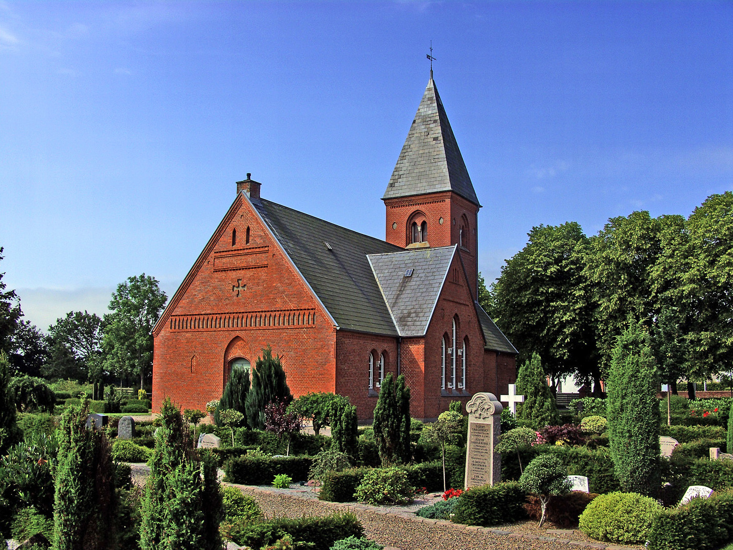 fra nordøst